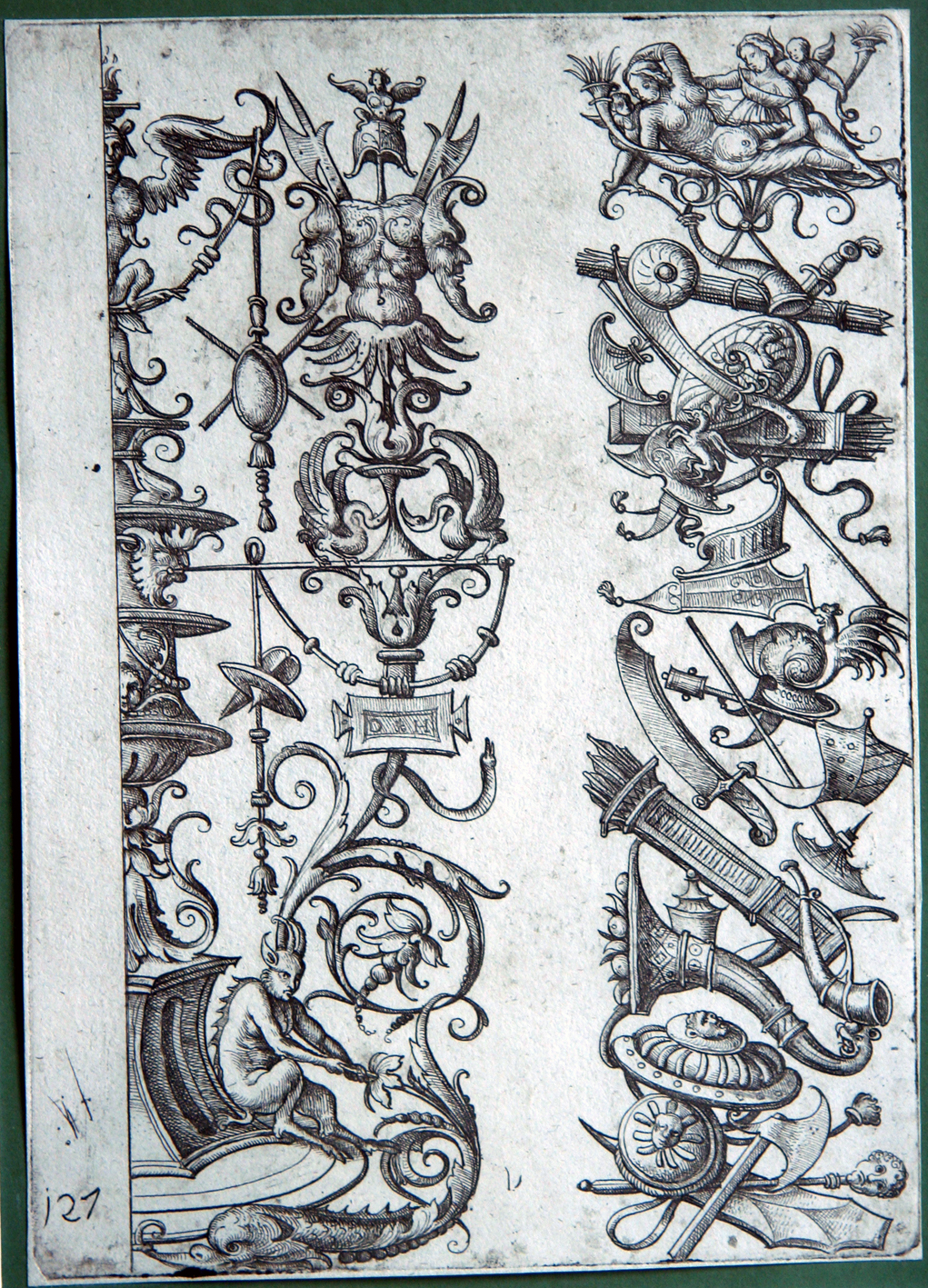 Hopfer, Daniel (ca 1470-1536): Two ornamental fillets with trophies. Zwei ornamentale Türfüllungen. Eisenradierung um 1500. Plattengröße 21,9 x 15,6 cm, mit winzigem Rändchen. (Minimale Altersspuren). Hollstein 139, ii/ii, with Funck number 127. Zustand (von 2, mit der Funck-Nummer "127" unten links)